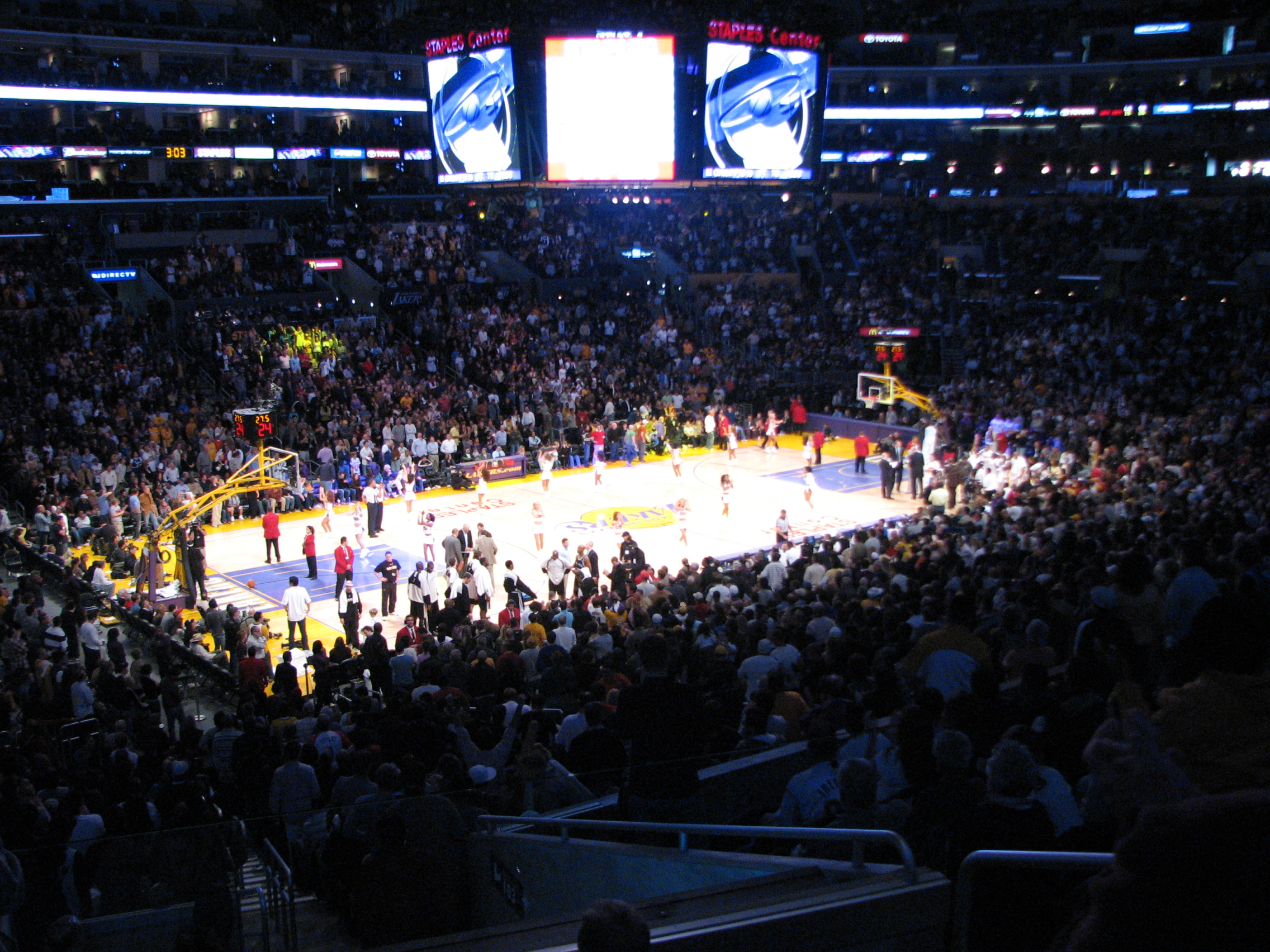 Intérieur du Staples Center